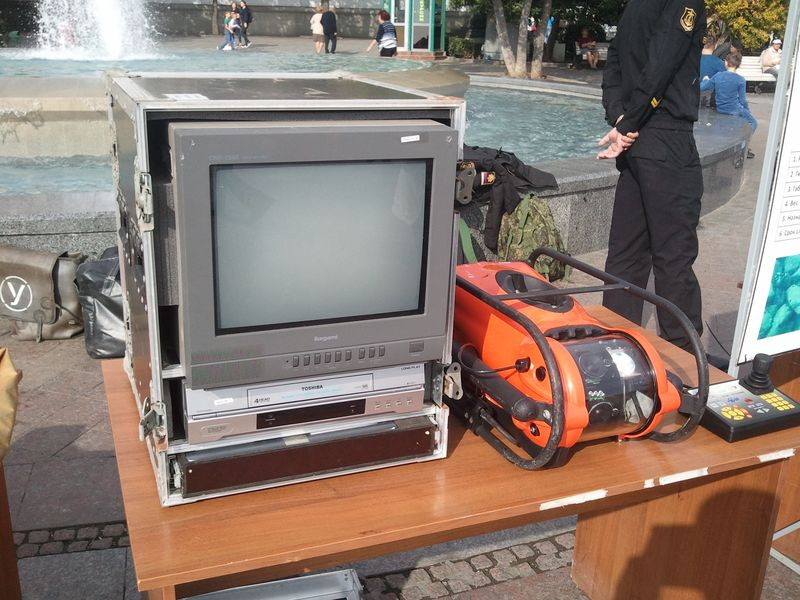 Комплекс телеуправляемого необитаемого подводного аппарата «Обзор-150»